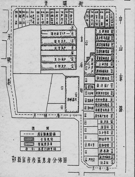 抗日战争时期宁波日军鼠疫罹难者分布